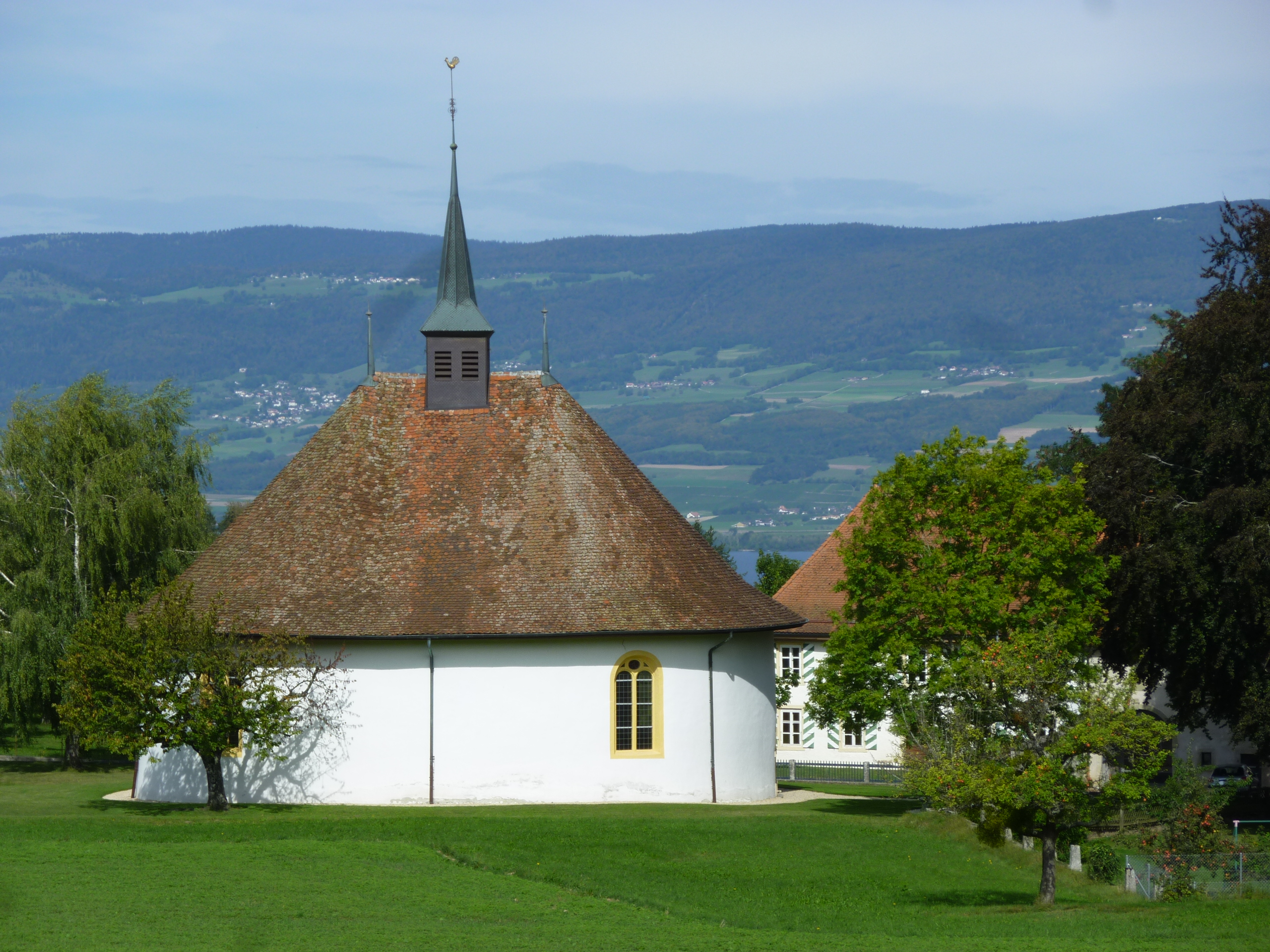 Ovale Kirche Chene-Paquier